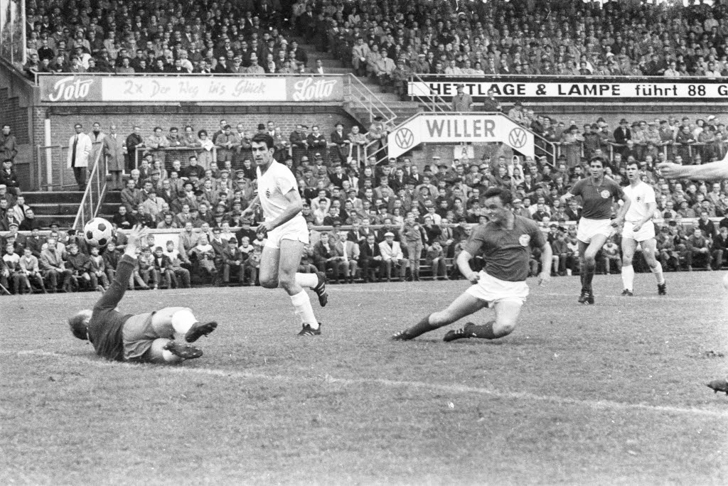 im Holsteinstadion. Tor für Holsteins durch Stürmer Gerd Saborowski (3.v.l.). Im Bild u.a. Gladbachs Torwart Manfred Orzessek (1.v.l.) und Holsteins Franz-Josef Hönig (4.v.l.).